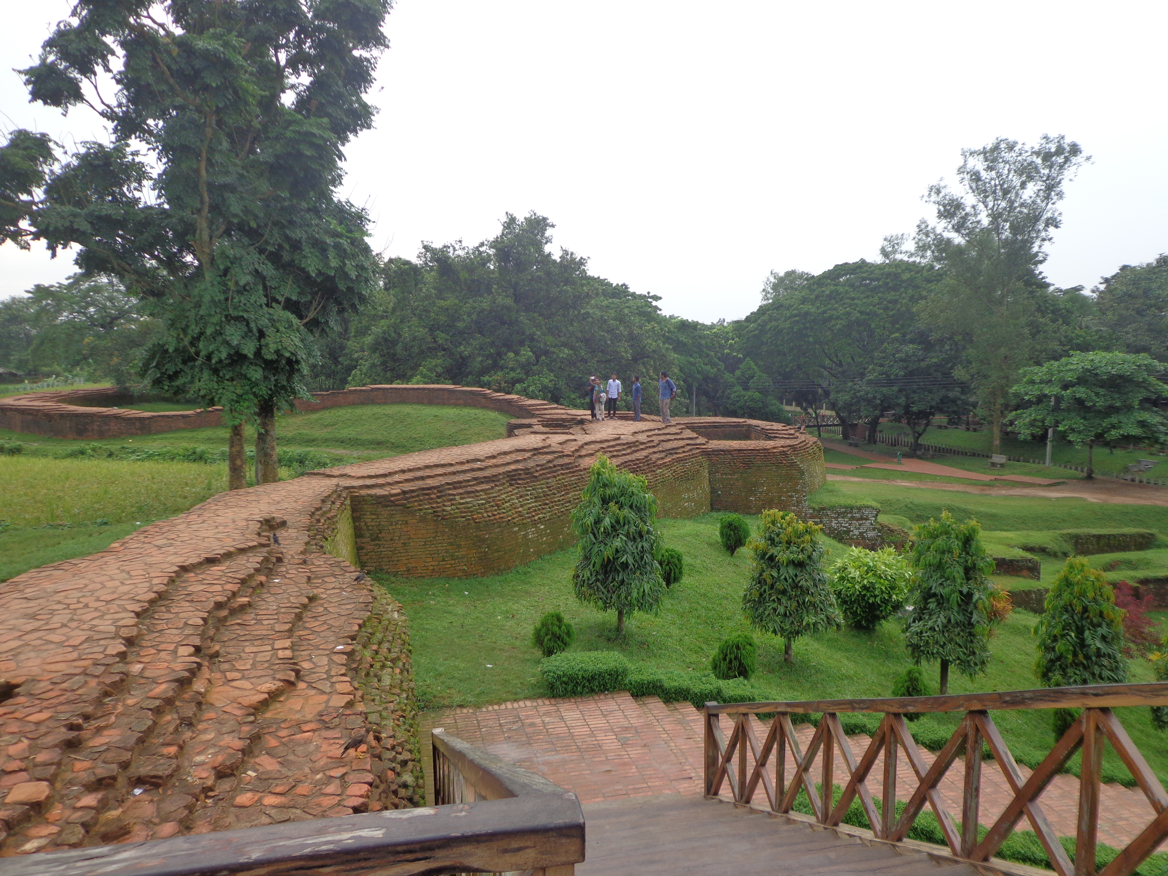 মহাস্থানগড়